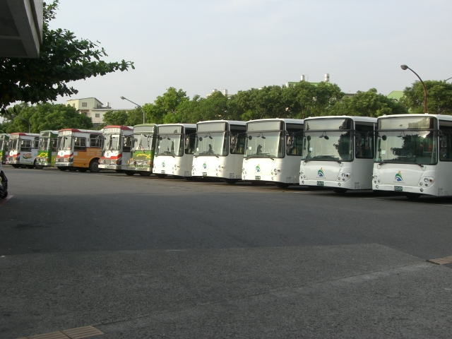 高雄市公車小港站的停車場